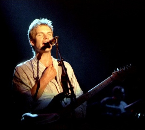 Sting, Drammenshallen, Norway